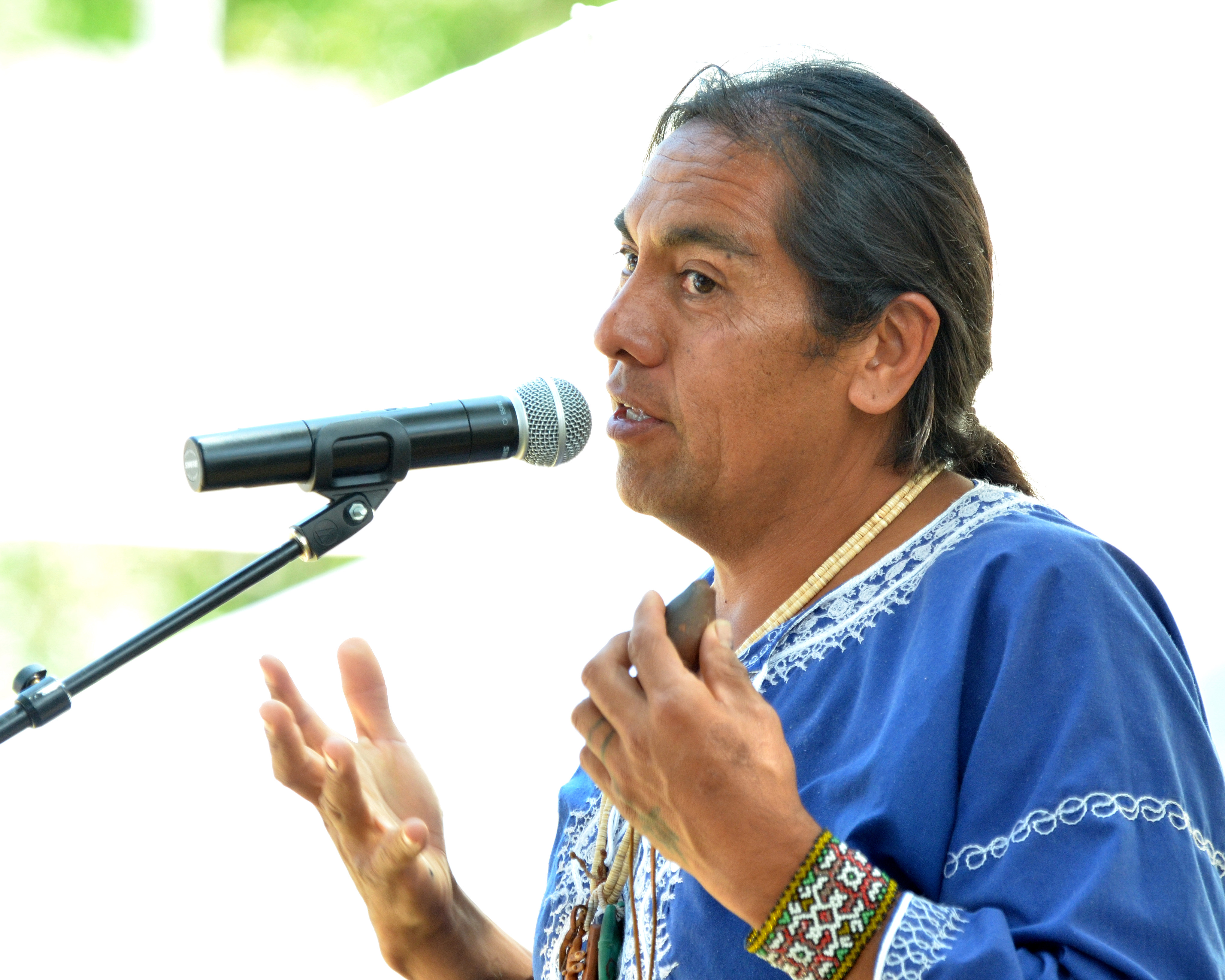 Francisco Fort Day, La Veta, Colorado